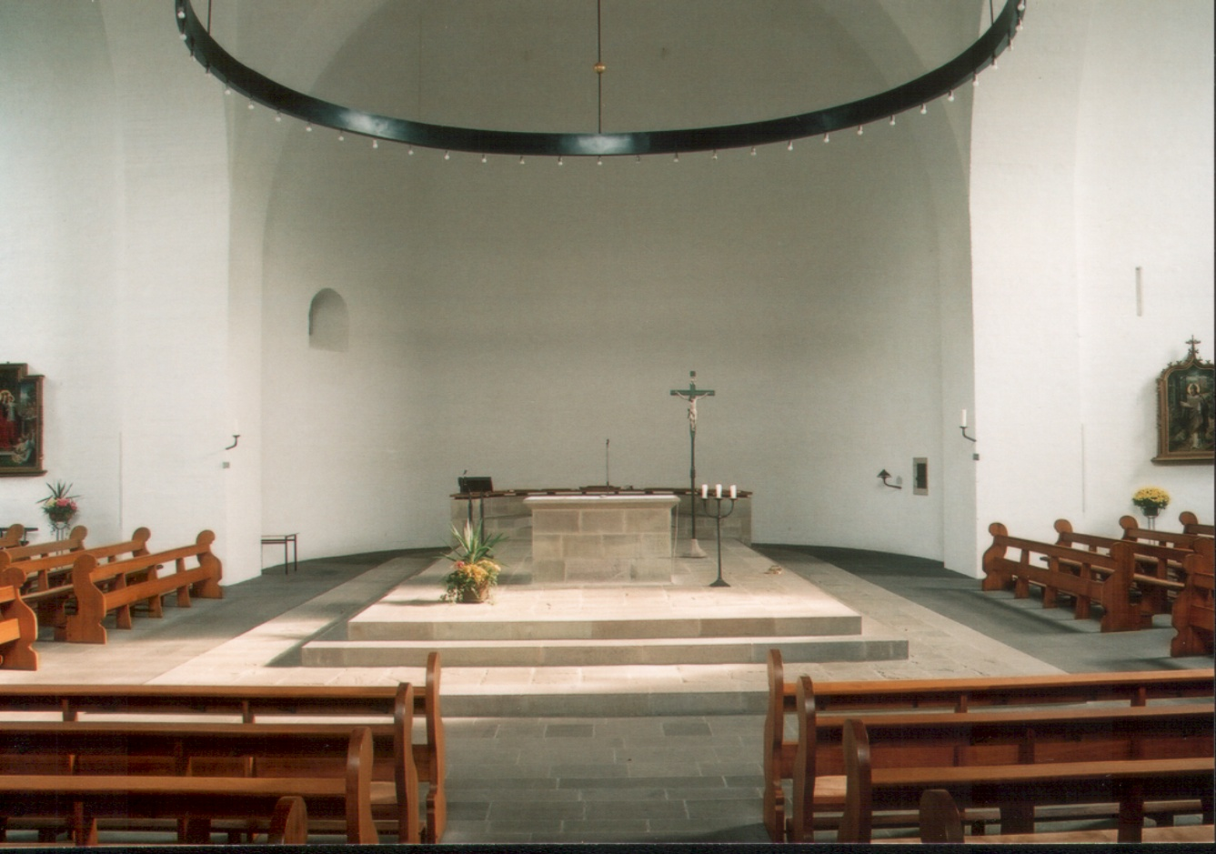 Katholische Kirche Cochem-Cond an der Mosel (1964-1968), Architekt Dr. Emil Steffann